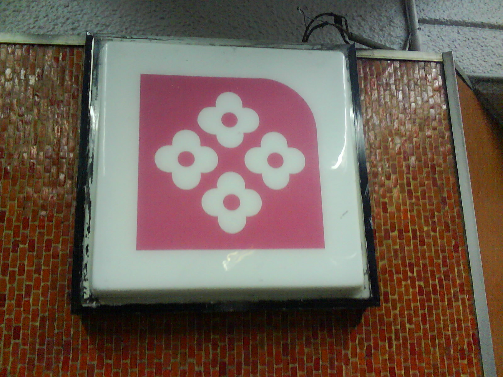 Señal del metro Balbuena de la Ciudad de México